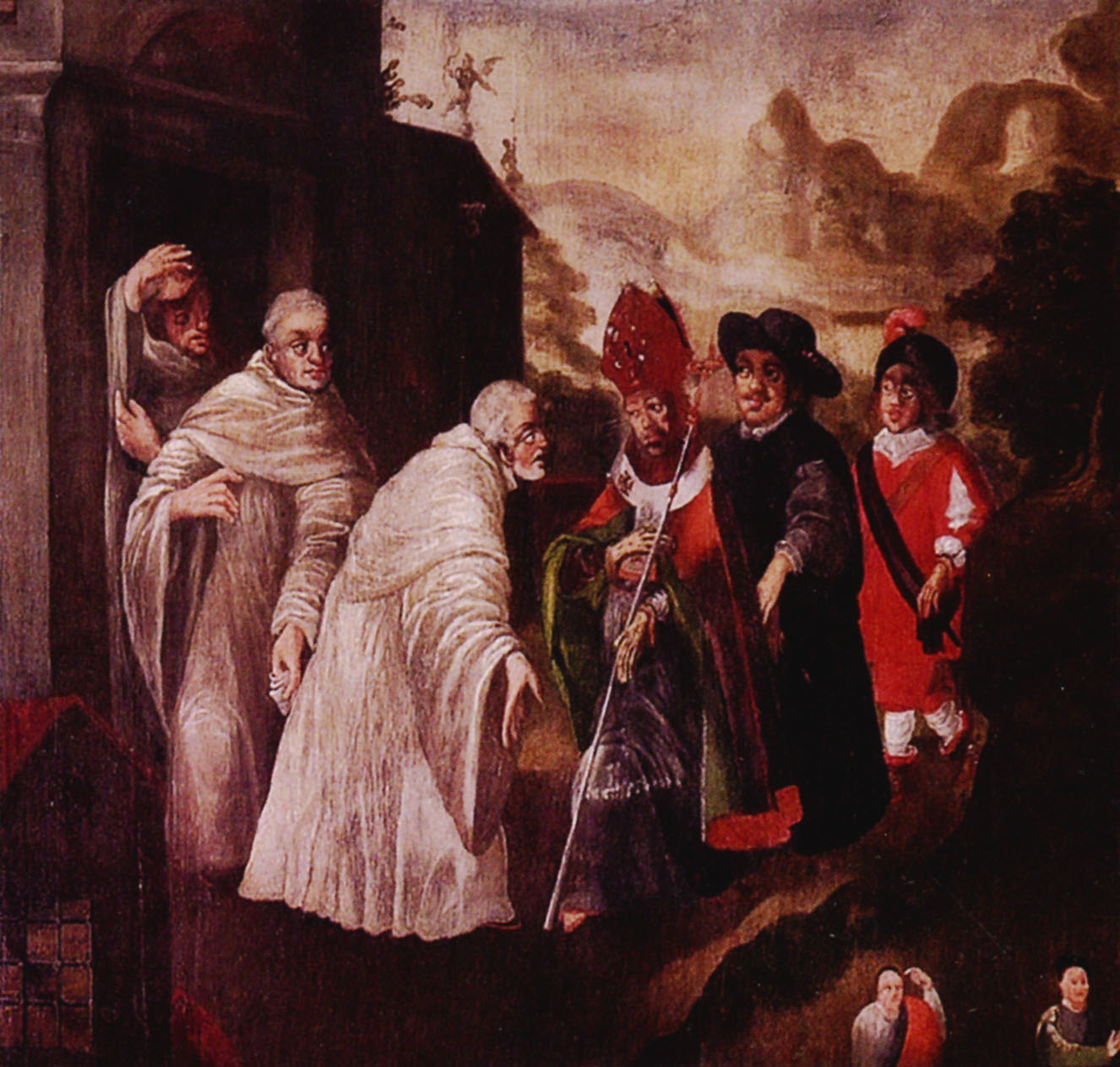 Bishop Otto Schenking in Sulejów